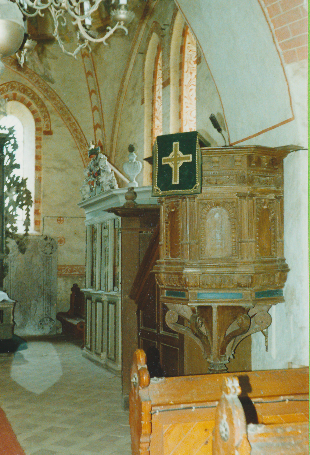 Innenansicht der Kirche von Hohen Sprenz Datum: um 1980 Urheber: verstorbene Bekannte der eigenen Familie Quelle: privates Fotoarchiv der eigenen Familie